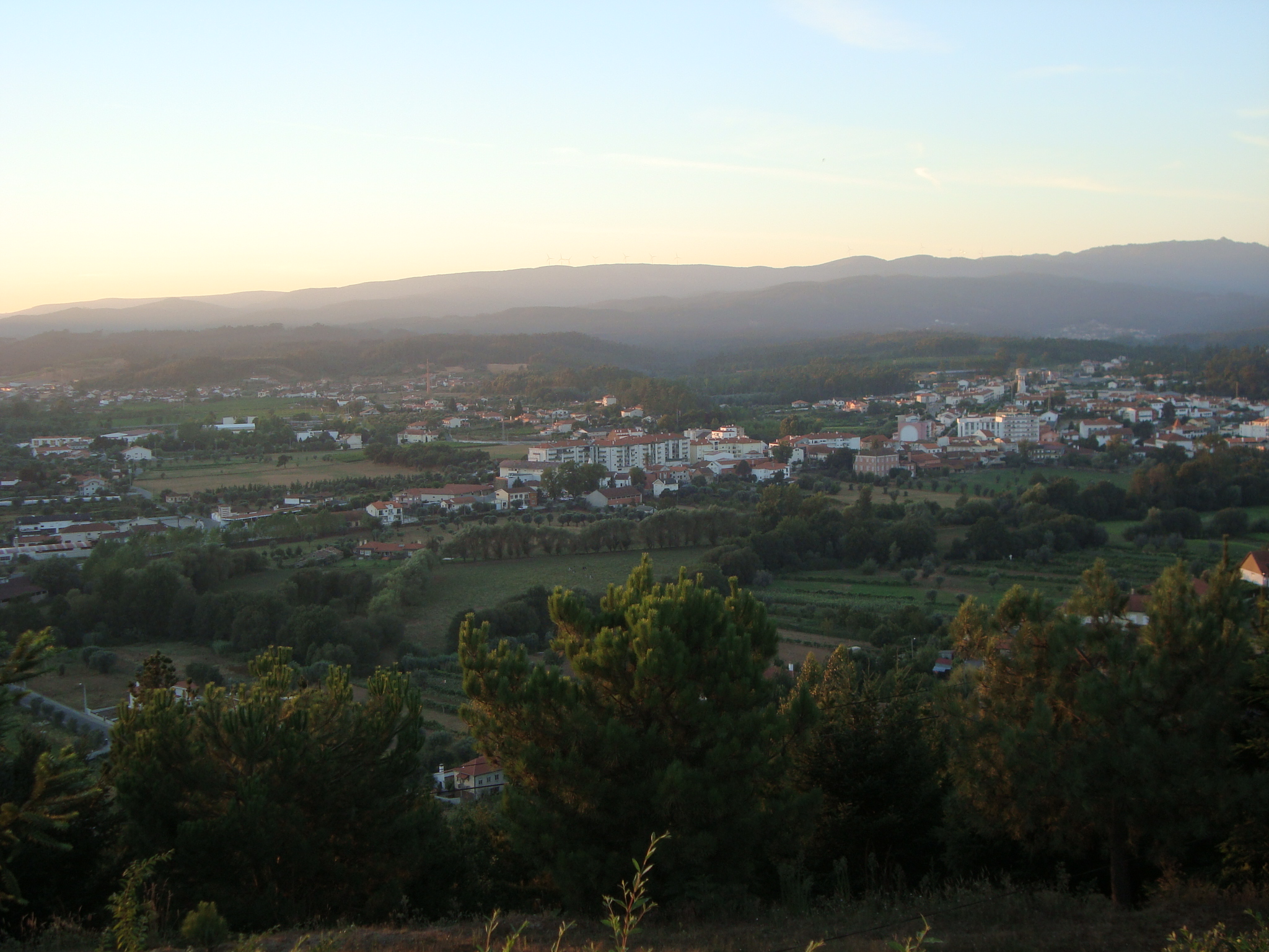 Vista de Mortágua, ao final da tarde